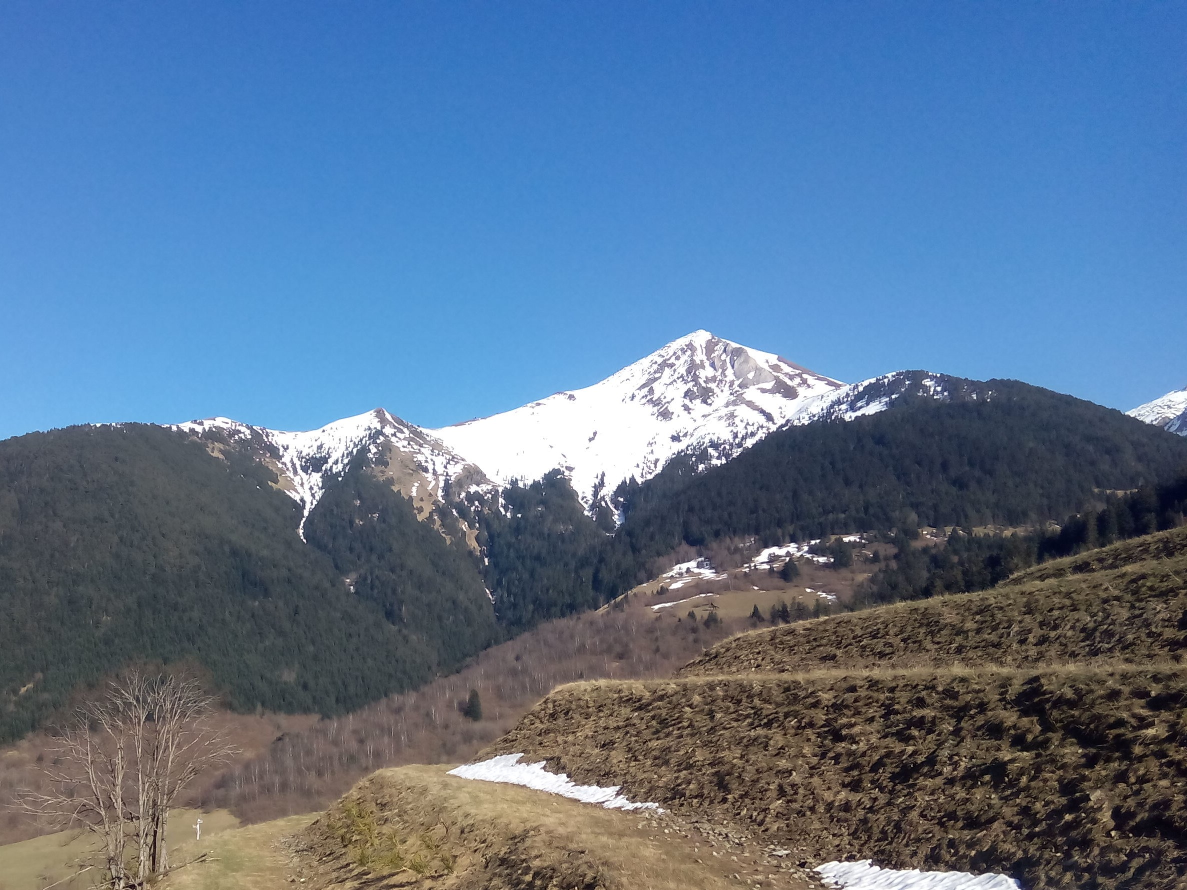 Vista de la montaña del Poi d'Estanho